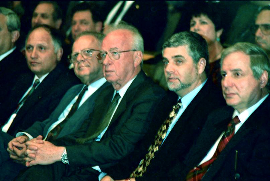 מנכ"ל משרד ראש הממשלה, שמעון שבס, עם ראש הממשלה יצחק רבין ומיכה חריש שר התעשיה והמסחר, בטקס הענקת הפרס הלאומי לאיכות בתעשייה